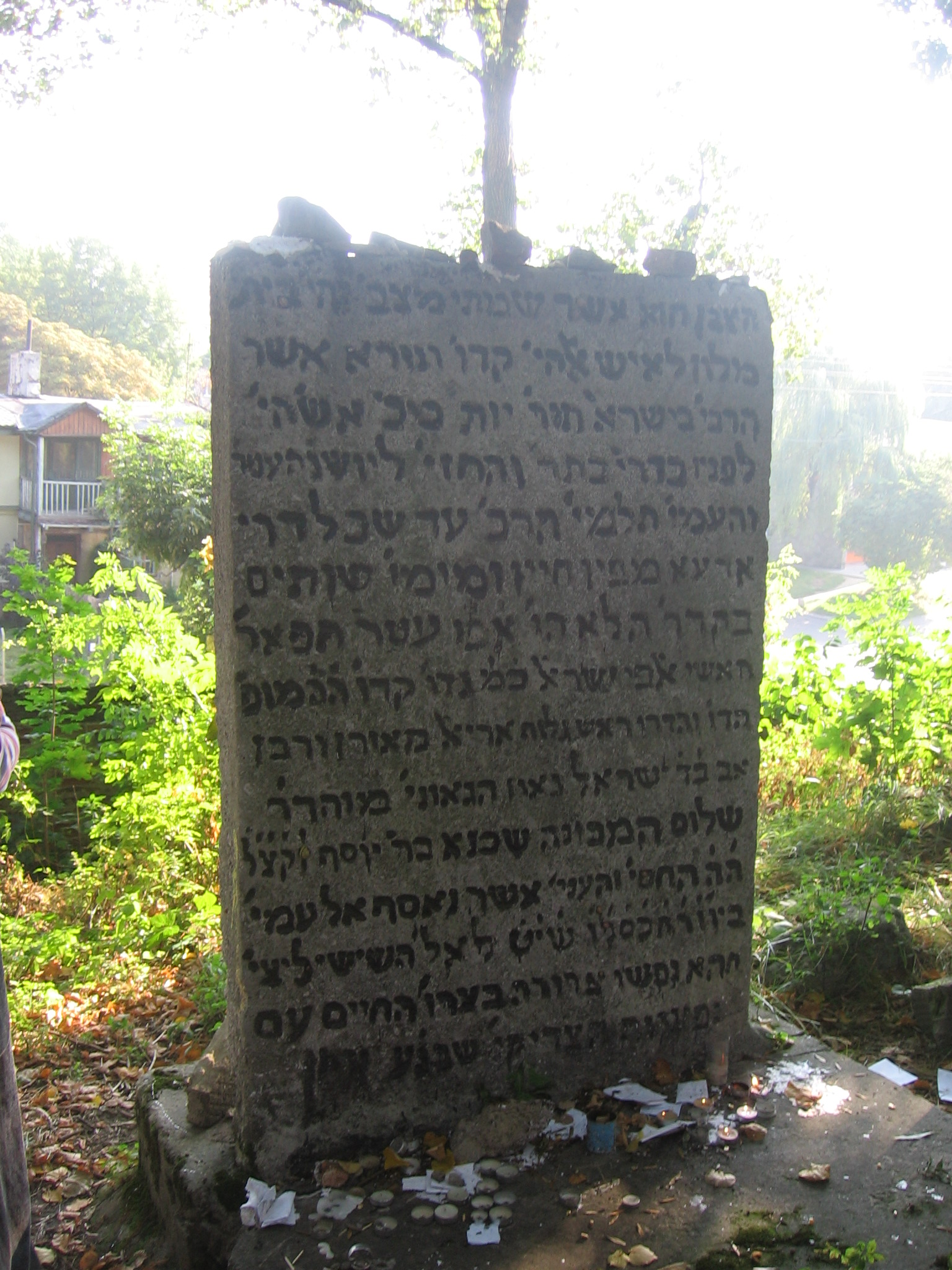 קברו של ר' שלום שכנא בבית הקברות היהודי בלובלין